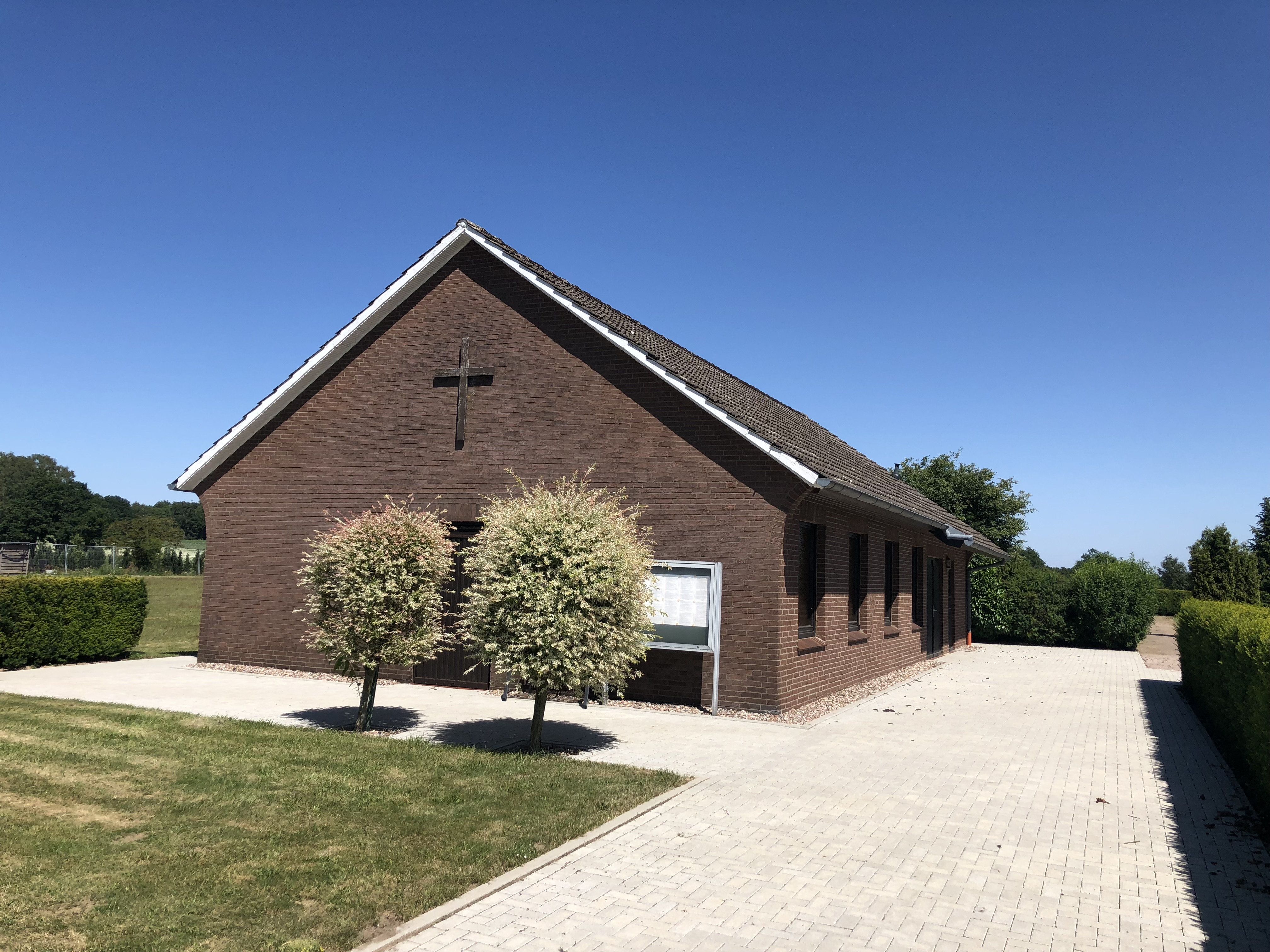 Kapell op’n Karkhoff in Sounsiek